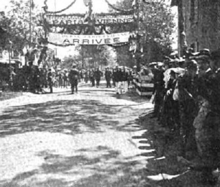 Paris-Vienne 1902 - contrôle de Belfort Histoire de l'automobile, Pierre Souvestre, éd. H. Dunod et E. Pinat, 1907 (ASIN B001BPBE58) p.560